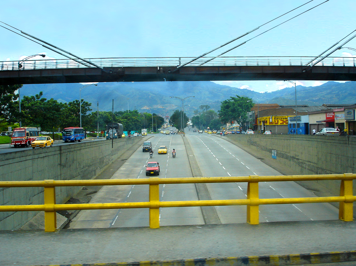 Avenida San Juan desde el centro, rumbo a los barrios La América y San Javier Image taken by uploadero on October 2006